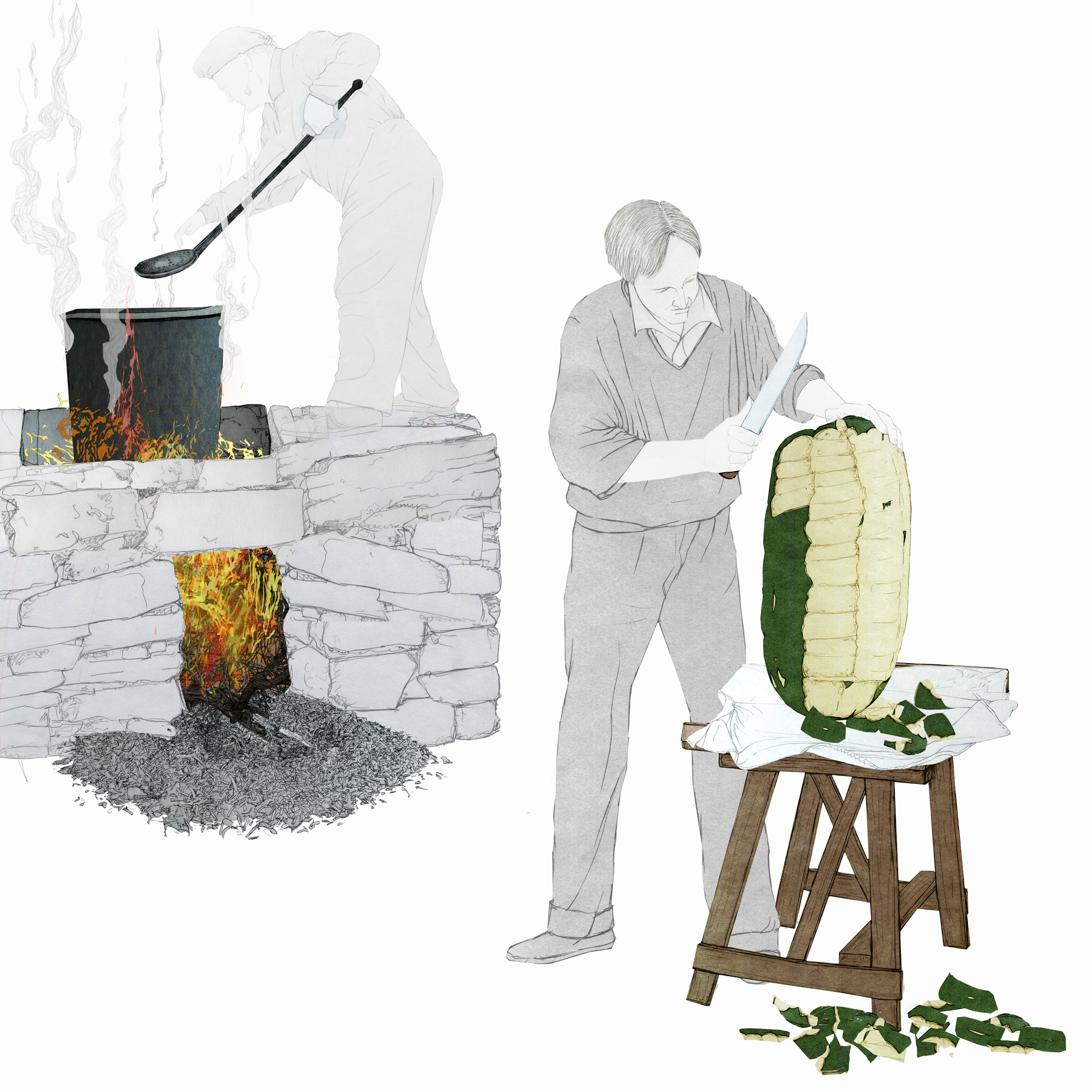 Imatges realitzades pel Museu Valencià d'Etnologia (Andrés Marín Jarque) per al Museu Comarcal de la Vall d'Albaida (Benissoda).